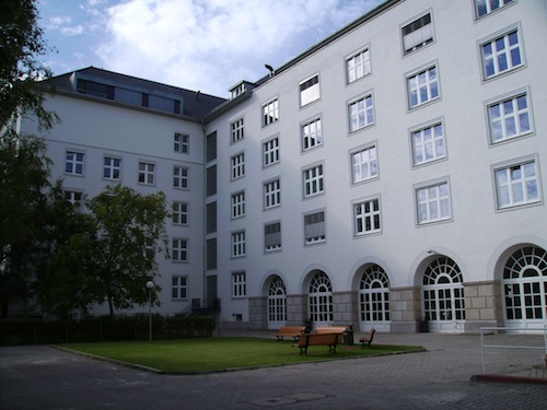 De locatie van de faculteit economie en management van de HWR in Berlijn. Voormalig hoofdgebouw van de Fachhochschule für Wirtschaft. Badensche Straße 50-51, 10825 Berlijn, Duitsland